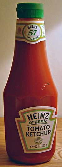 Schedro_ketchup